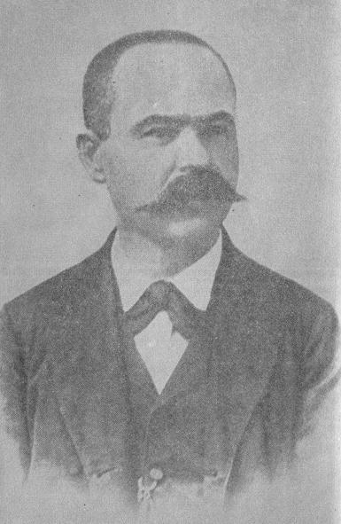 Ефрем Каранов.